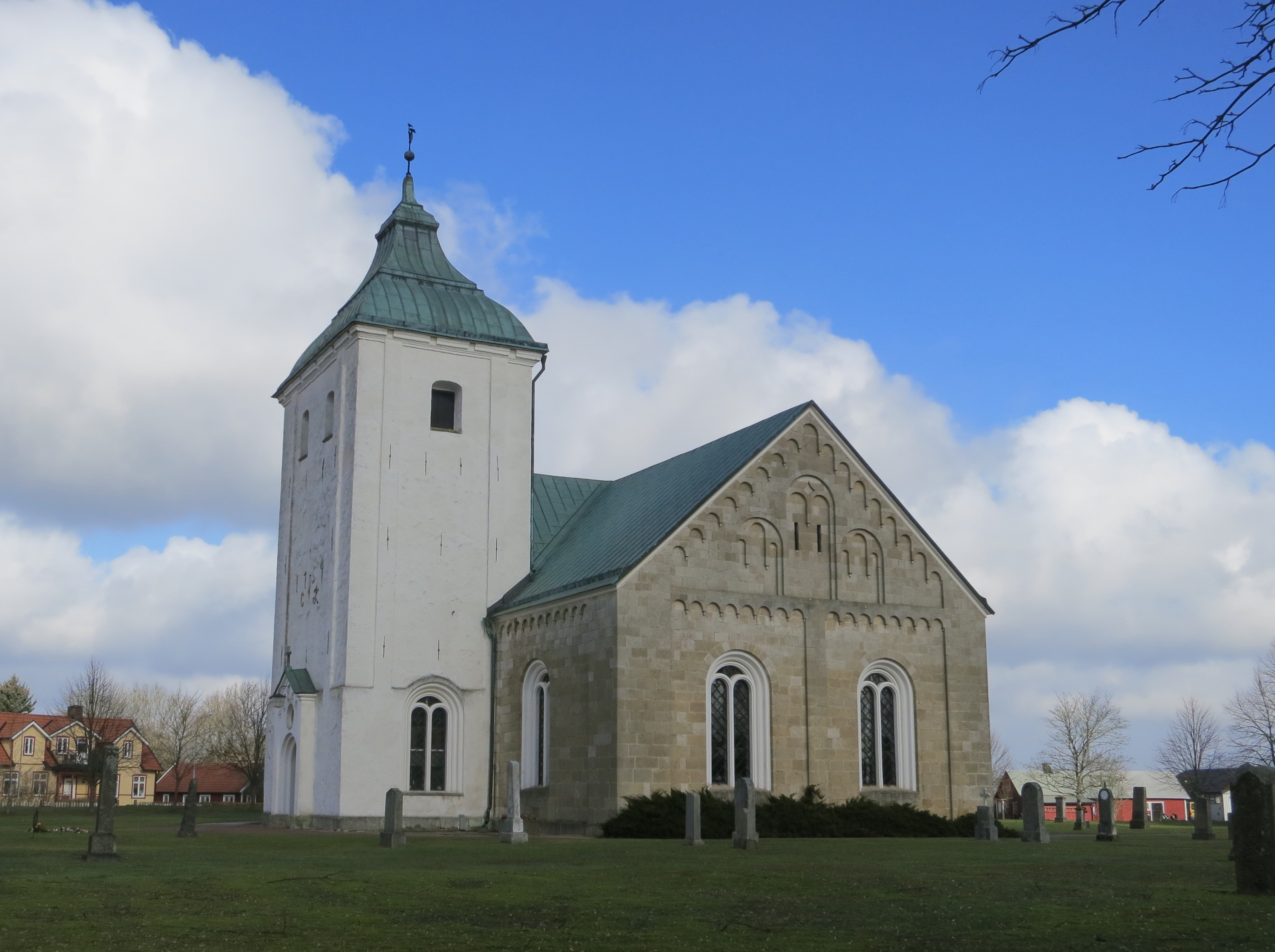 Vinslövs kyrka i februari 2015